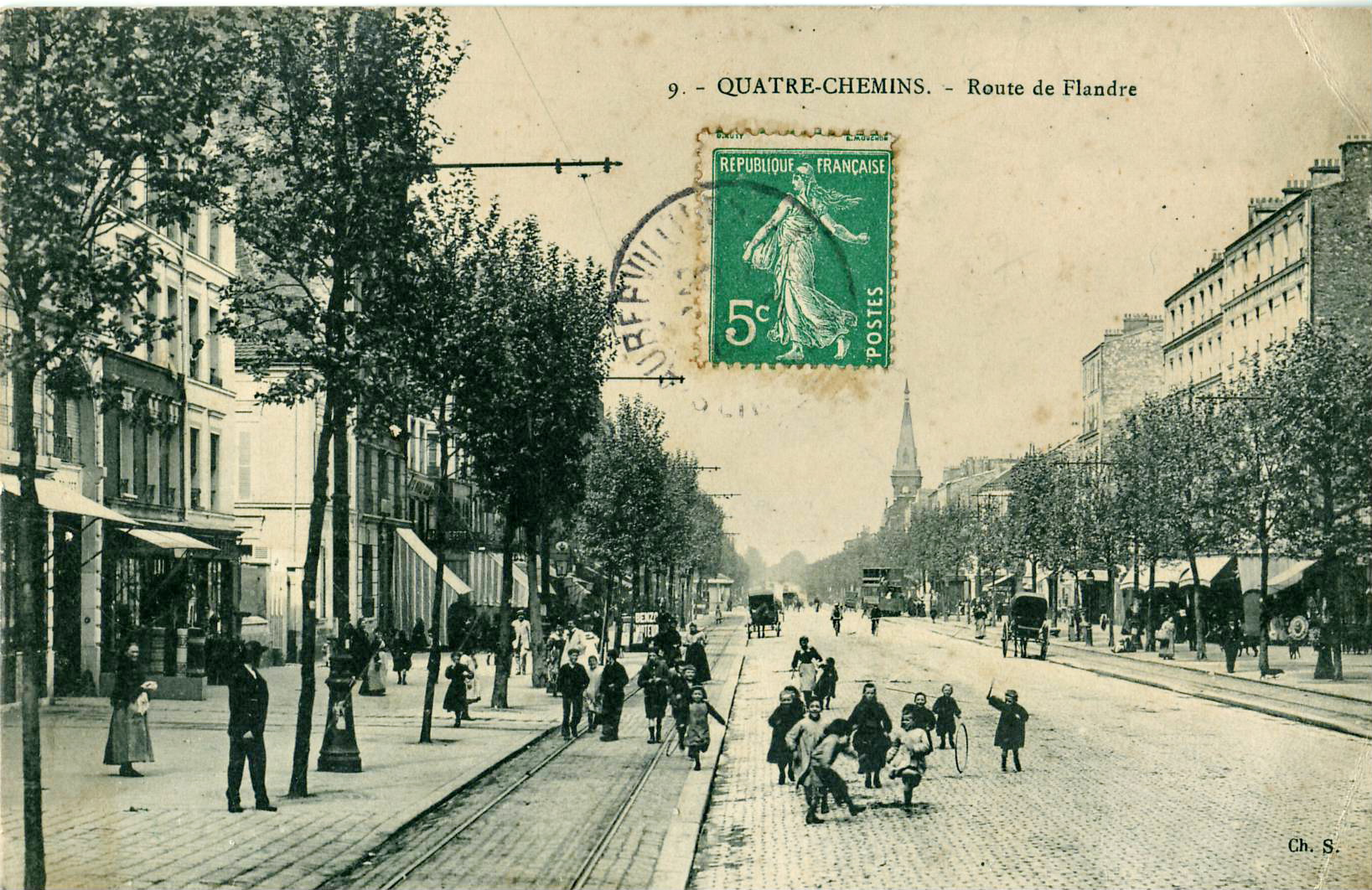 Carte postale ancienne éditée par Ch. S. N°9QUATRE CHEMINS - Route de FlandreOn distingue clairement, le long de la RN2, les voies de l'ancien tramway implantées en sites propres latéraux.